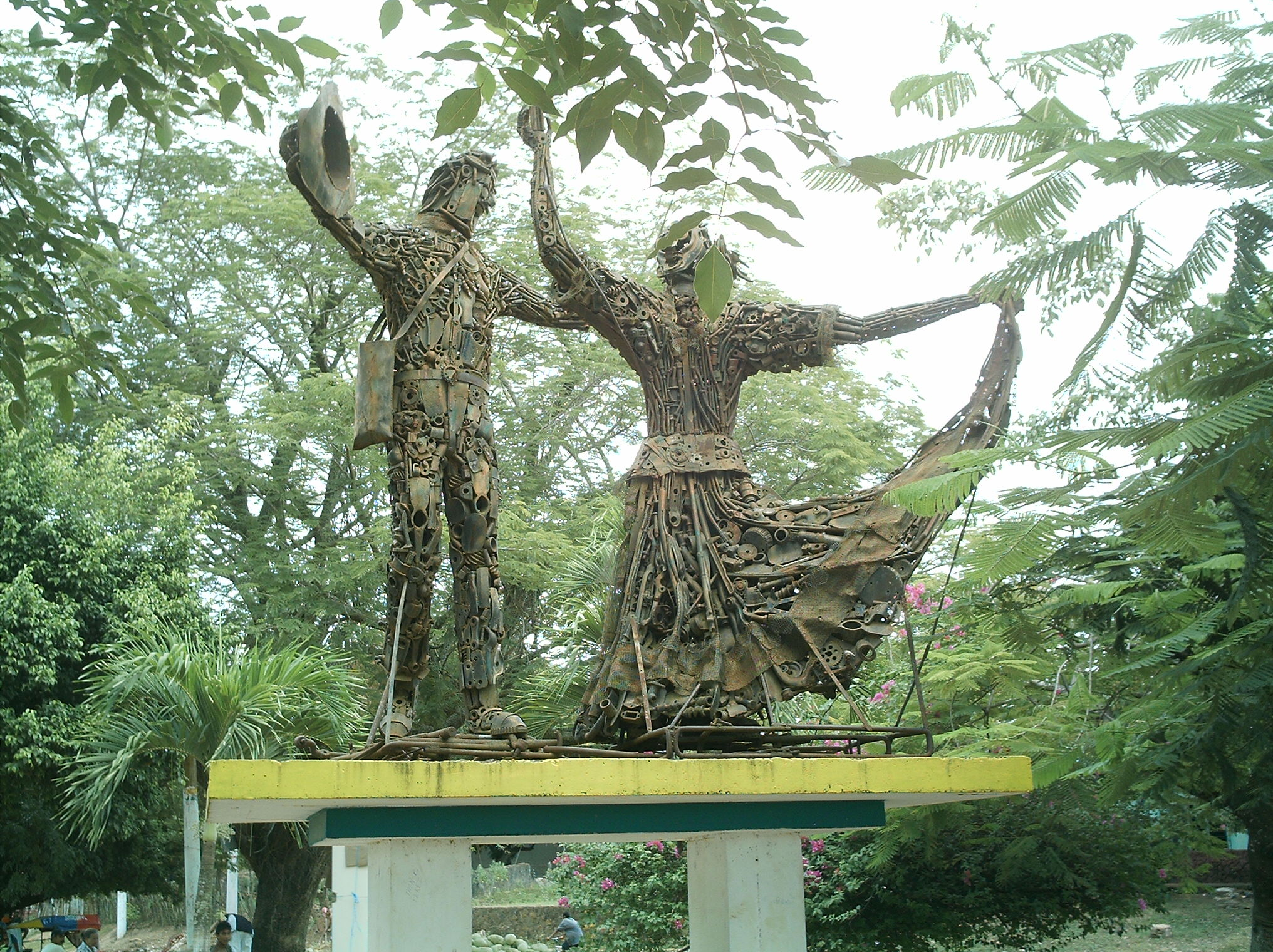 El Banco es llamada la ciudad imperio de la cumbia, este es un monumento a ese ritmo caribeño